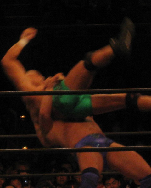 2014年3月23日 ベイコム総合体育館 「NEW JAPAN CUP Final」 邪道にバックドロップホールドを仕掛ける永田裕志